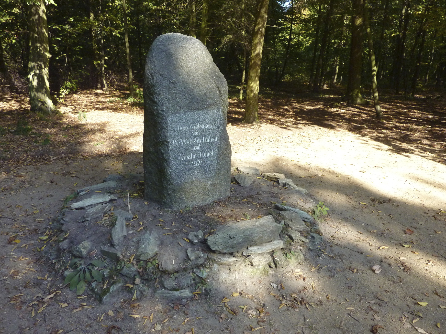 Frankfurt am Main, Hessen: Die Kobeltruhe (auch Kobelt-Ruhe) ist ein Rastplatz und Ausflugsziel im Frankfurter Stadtwald. Der 1921 eingerichtete Platz ist der Erinnerung an Amalie Kobelt und ihren Ehemann, den Frankfurter Arzt Prof. Dr. Wilhelm Kobelt (1840-1916) gewidmet, der im Jahr 1908 an dieser Stelle eine der ersten Wald-Erholungsstätten Deutschlands hatte einrichten lassen. Das Foto zeigt den 1921 errichteten Gedenkstein für Amalie und Wilhelm Kobelt